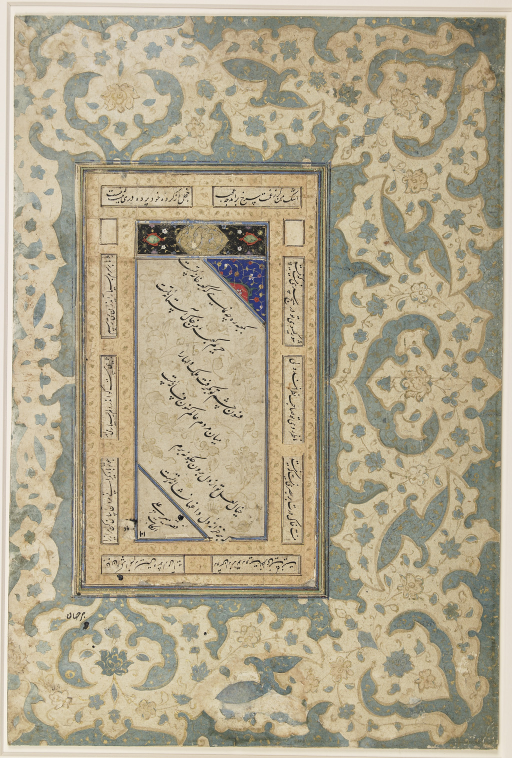 Calligraphie de Mir 'Ali al-Katib (Vers 1476-1543)